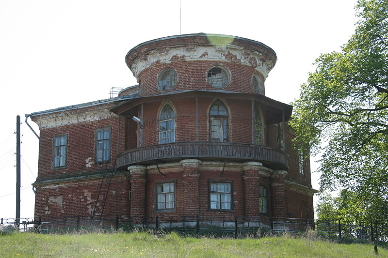 Дом Баташева, вид со стороны Реки